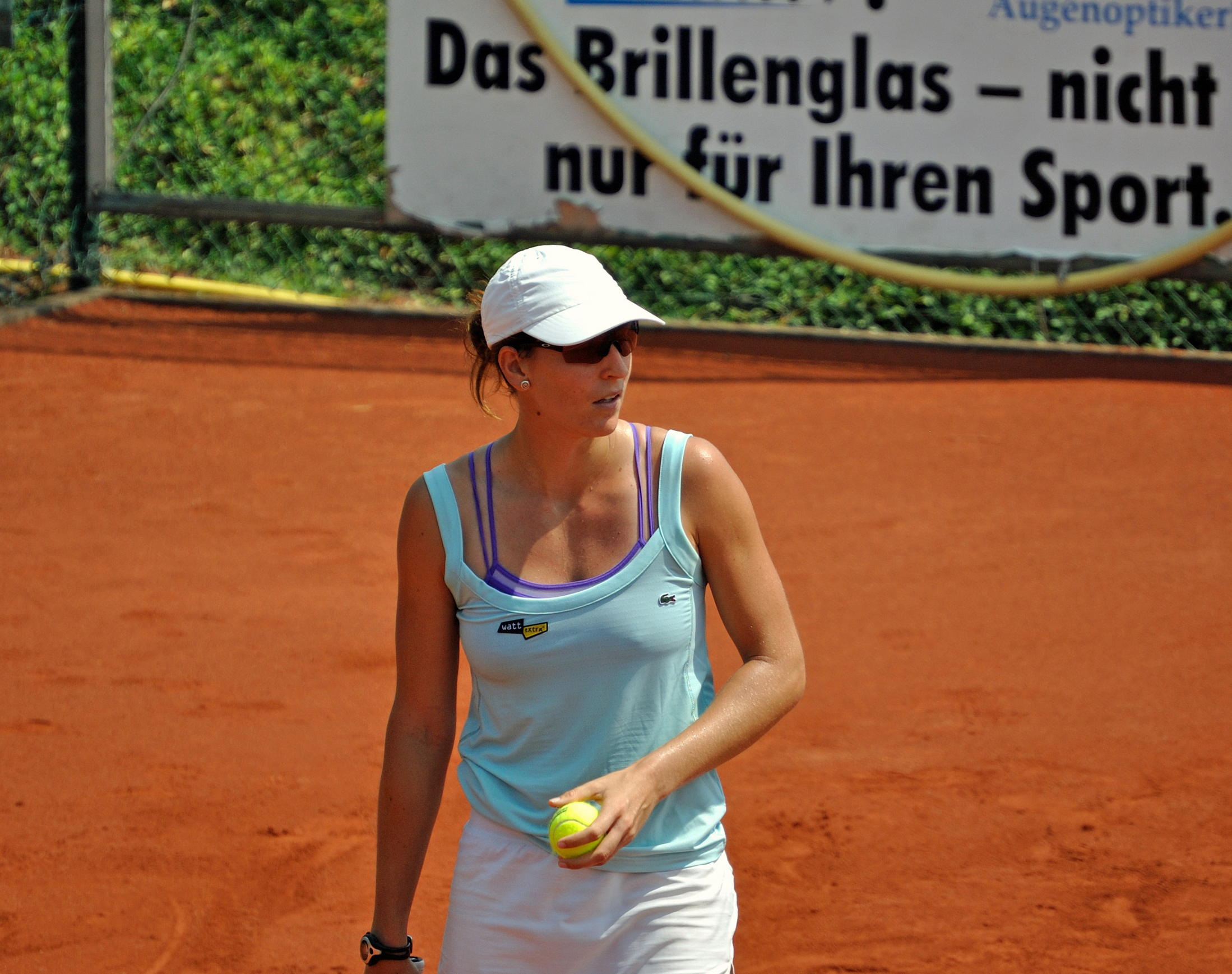 Ein Bild, das während eines Tennisspiels der Damen-Bundesliga zwischen dem TC Moers 08 und TC WattExtra Bocholt am 11. Juli 2010 in Moers stattfand.